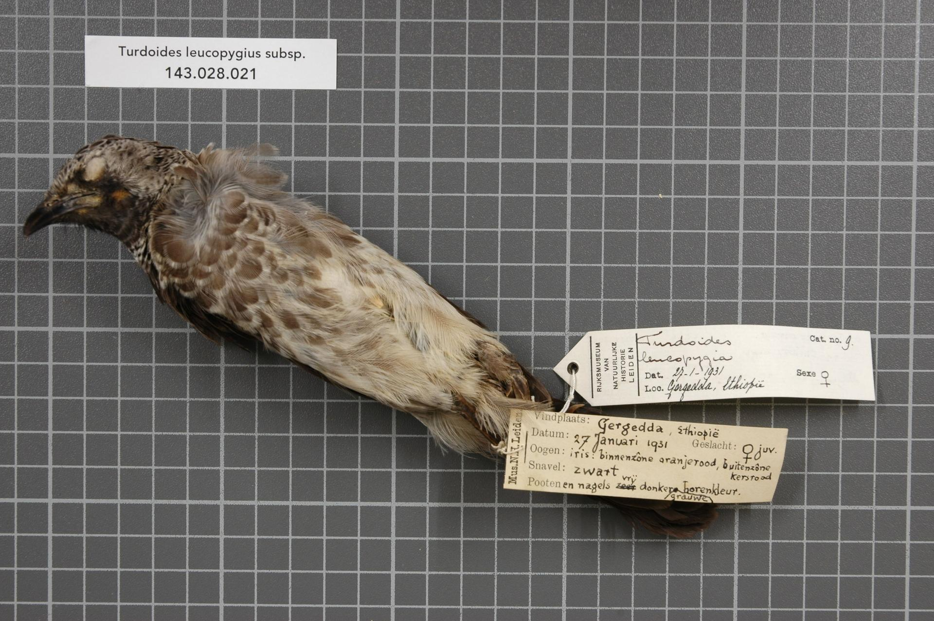 Turdoides leucopygius subsp.